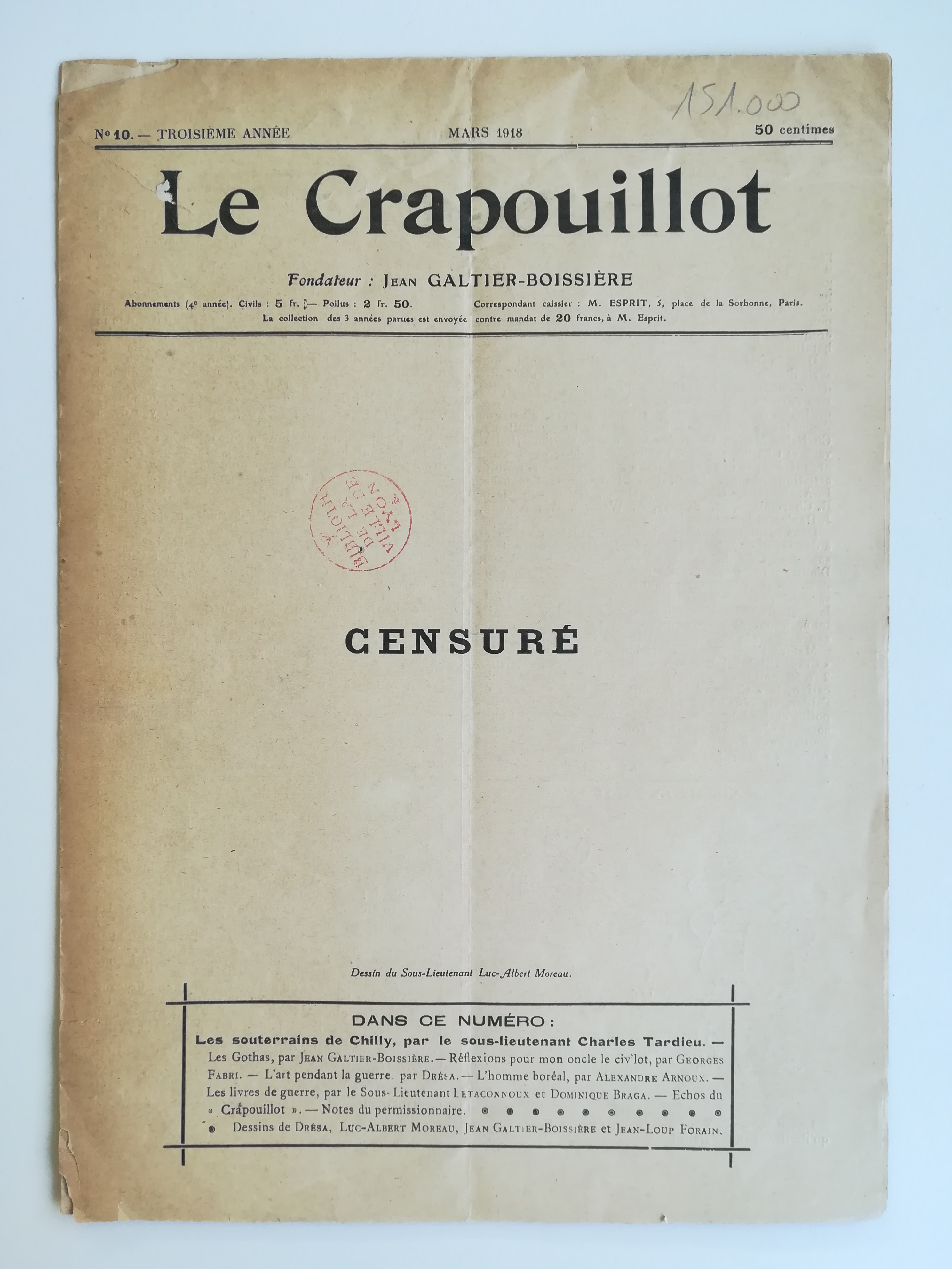 Couverture du Crapouillot ne comportant qu'une mention : Censure